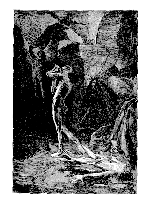 Portada de "Los cantos de Maldoror" de Comte de Lautreamont